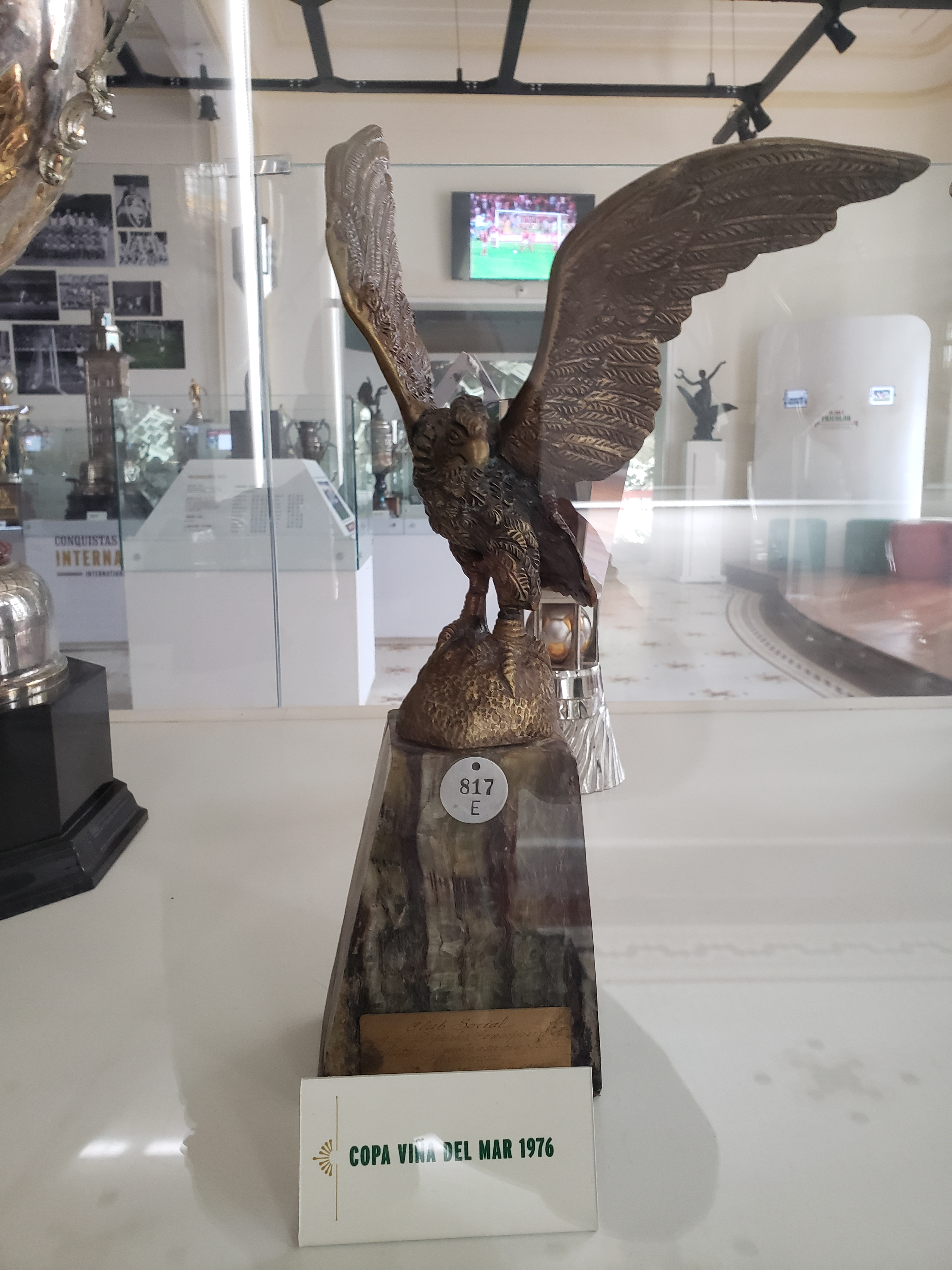 Copa Vina del Mar de 1976, torneio internacional conquistado pelo Fluminense Football Club.